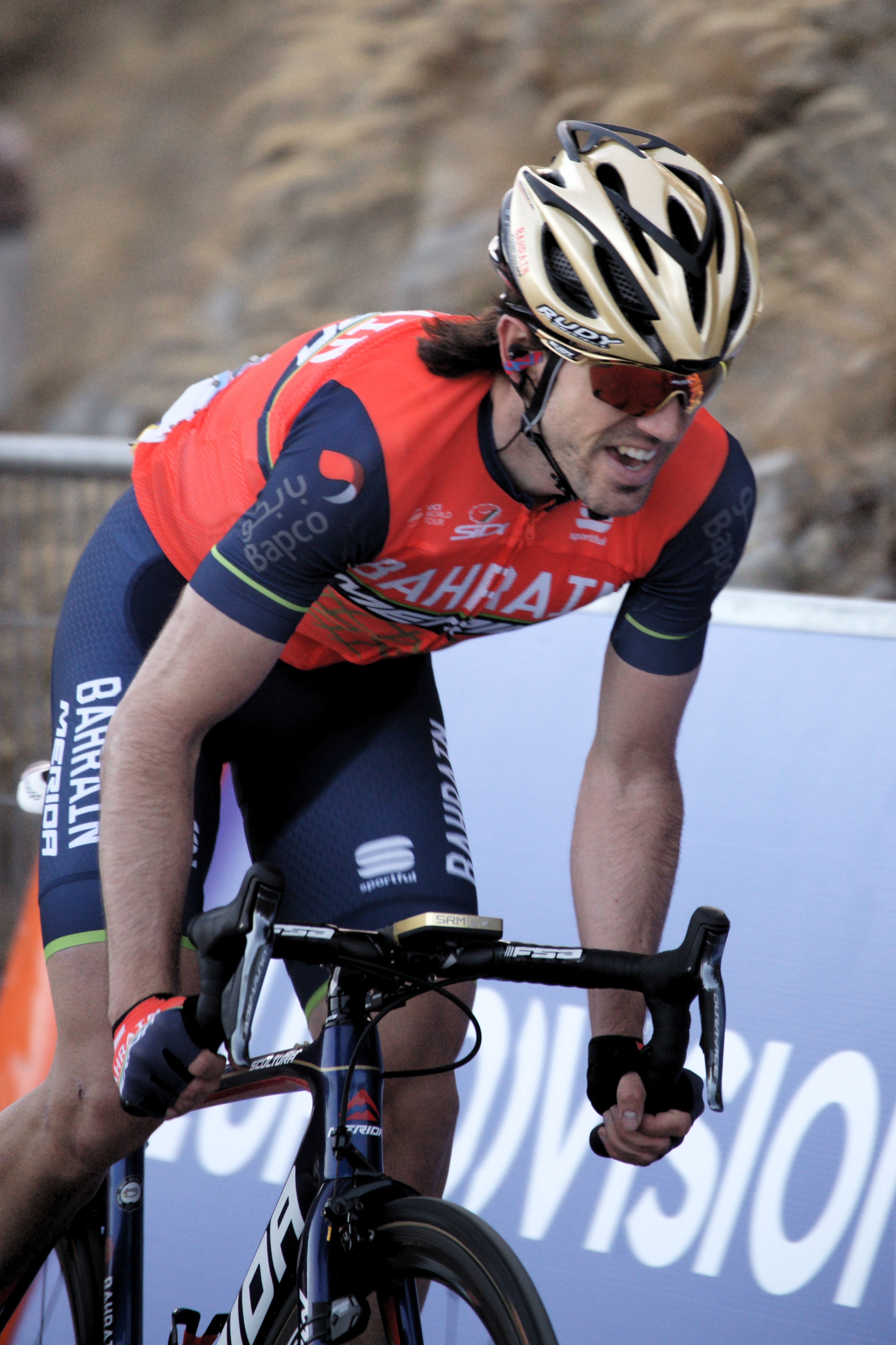 Jon Izaguirre Insausti Roubion Paris-Nice 2017